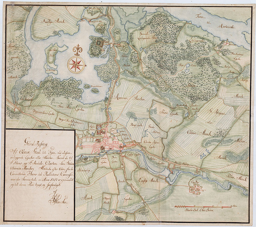 Åløkke Skoven Odense 1717